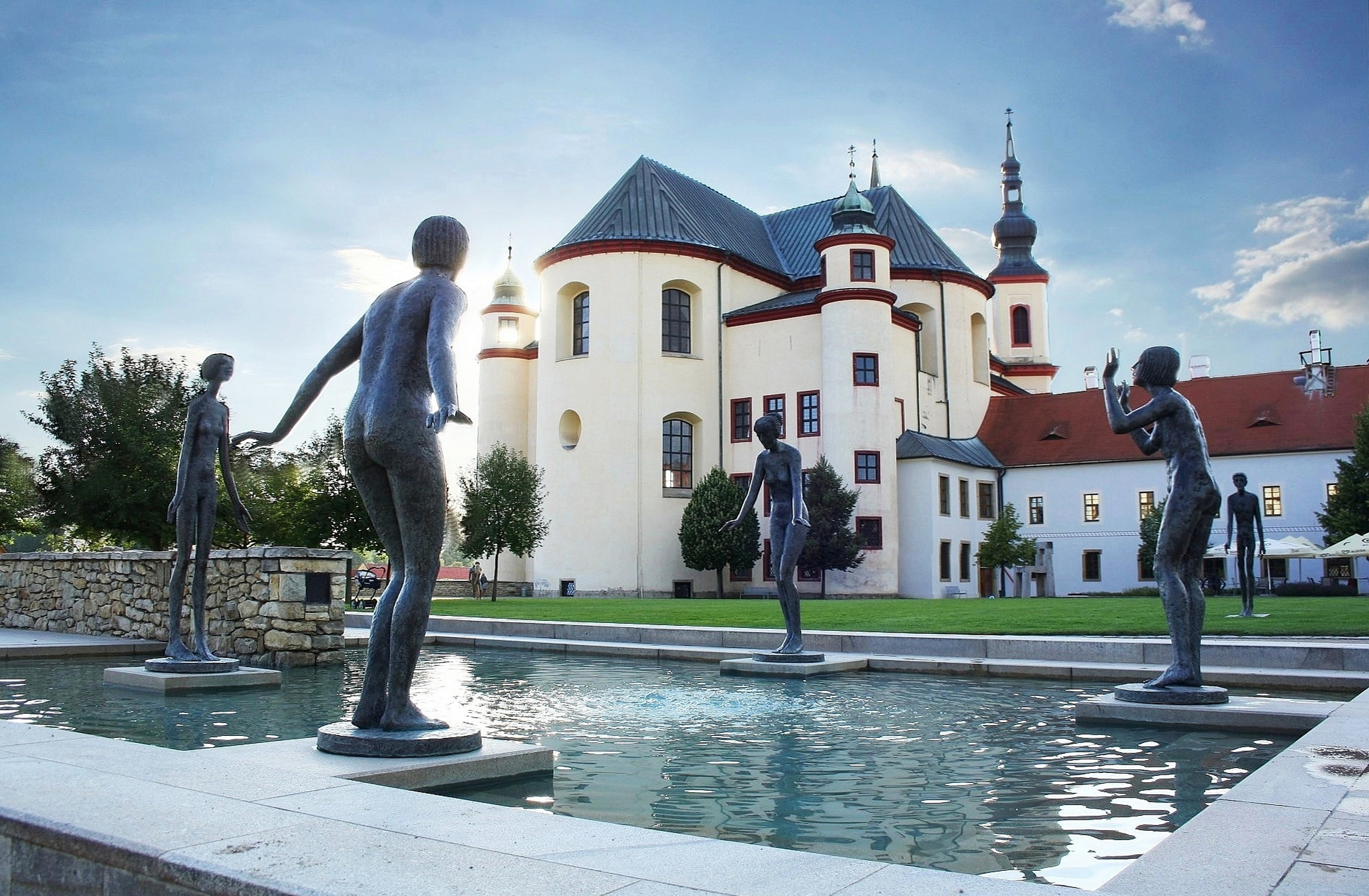 Piaristický kostel Nalezení svatého Kříže s kolejí, Jiráskova 8, tzv. Hora Olivetská, Litomyšl-Město, Litomyšl.